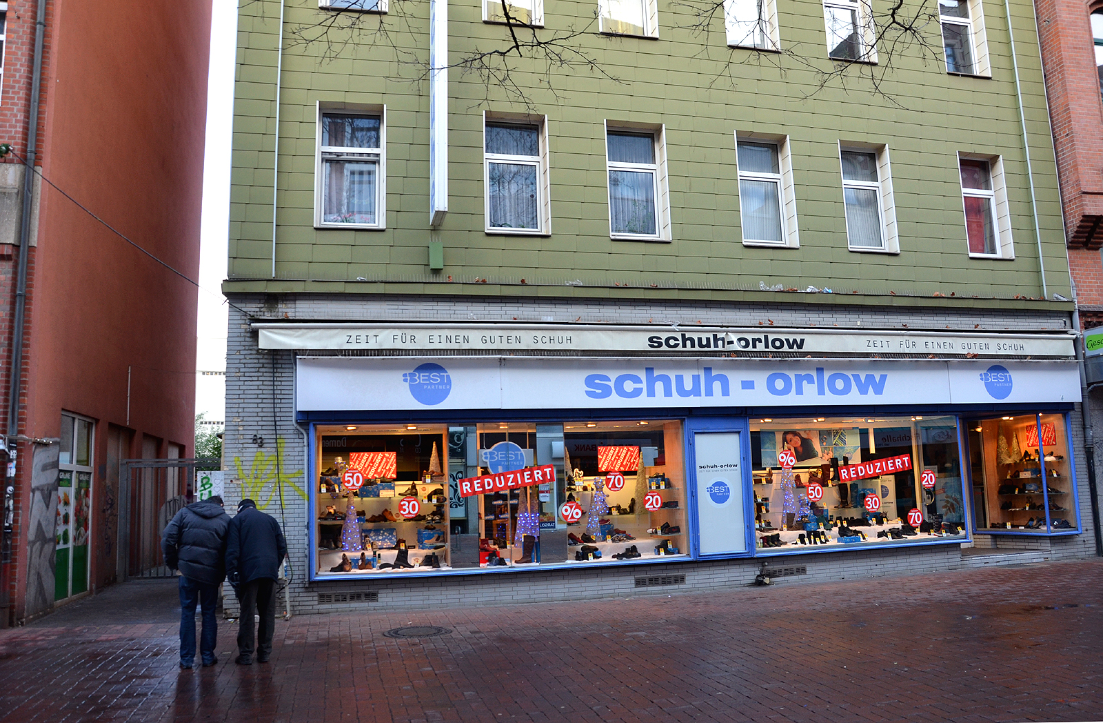 Passanten bemerken den 2008 verlegten und zu Weihnachten 2013 vorsichtig gesäuberten Stolperstein vor dem Gebäude Lister Meile 83 in Hannover (vor den Schaufenstern von "Schuh-Orlow") mit der Kurzinformation: „Hier wohnte für Kurt Willkomm, Jahrgang 1904, verhaftet 5.11.1933, Polizeigefängnis, gefoltert, tot 16.11.1933“ ...